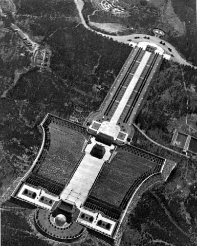 中山陵航拍